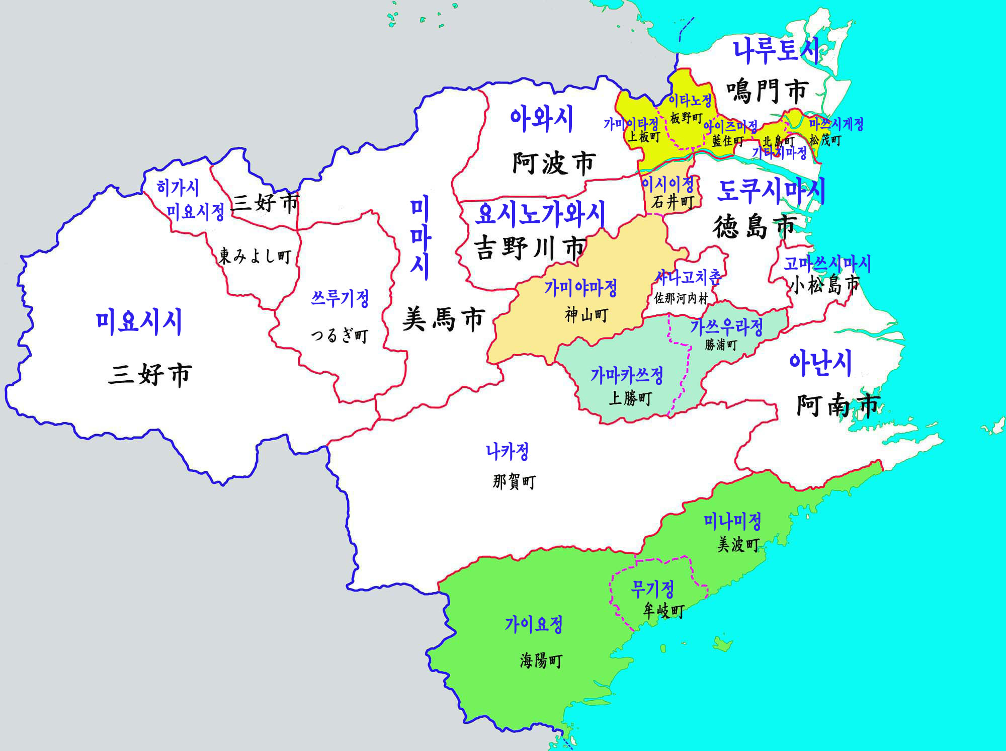 도쿠시마현 행정구역